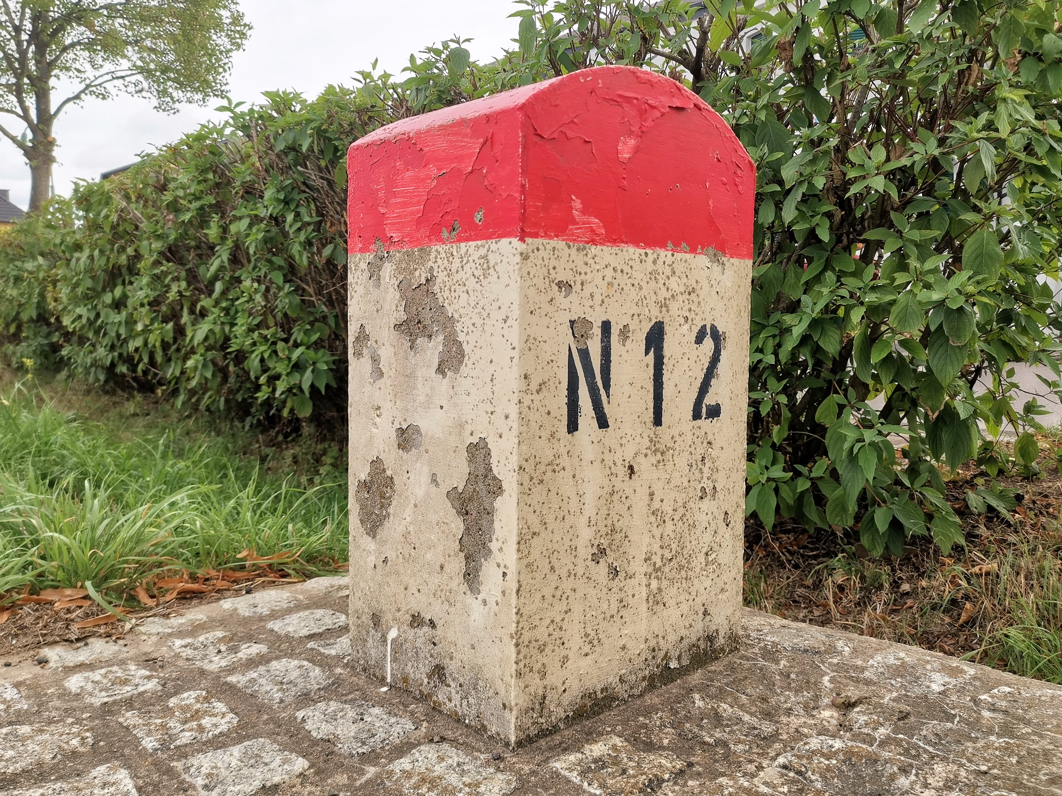 Borne kilométrique N12 à Tuntange.